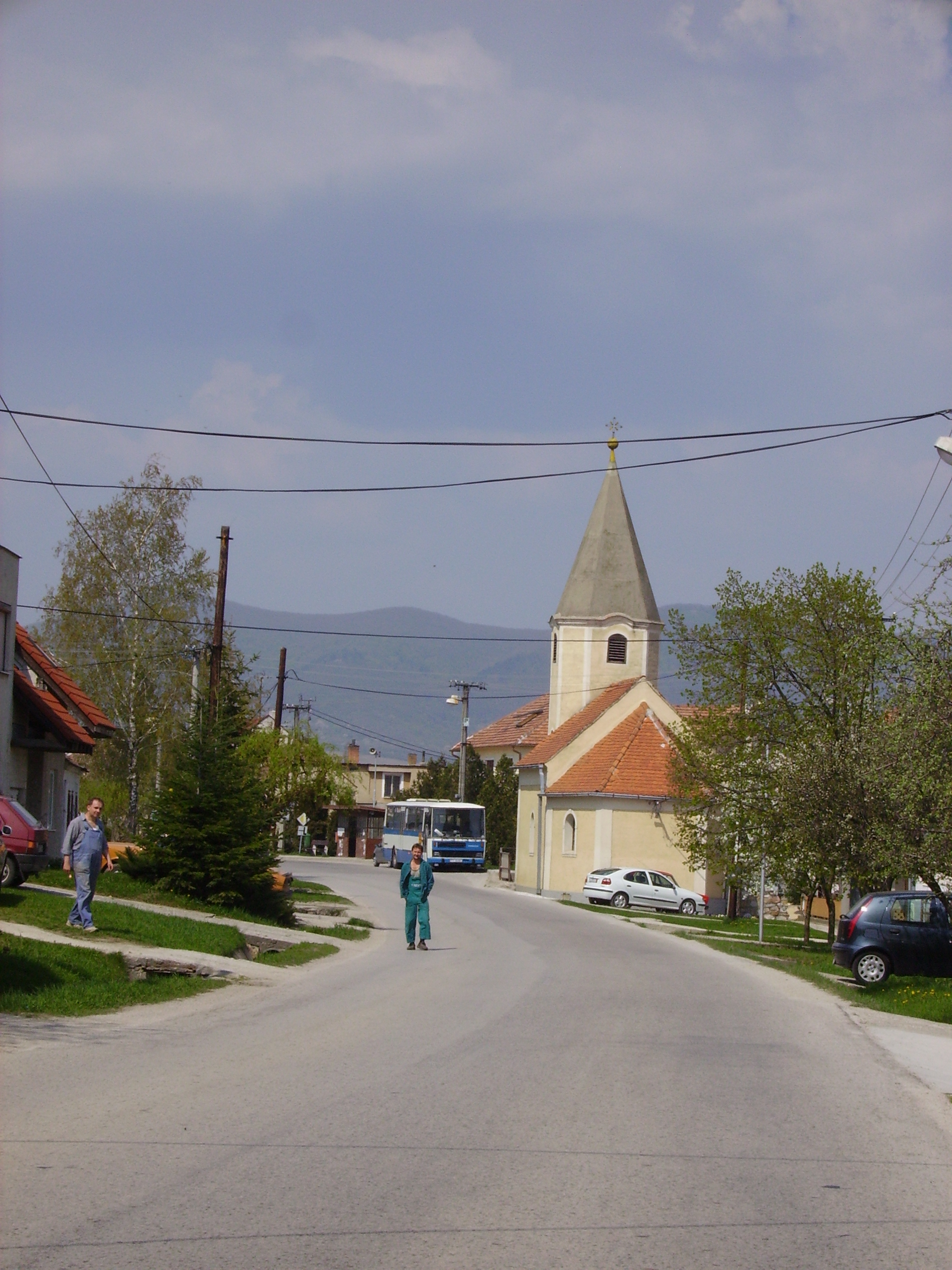 Descr.: Košolná, Slovakia Author: Radovan Bahna, 2006